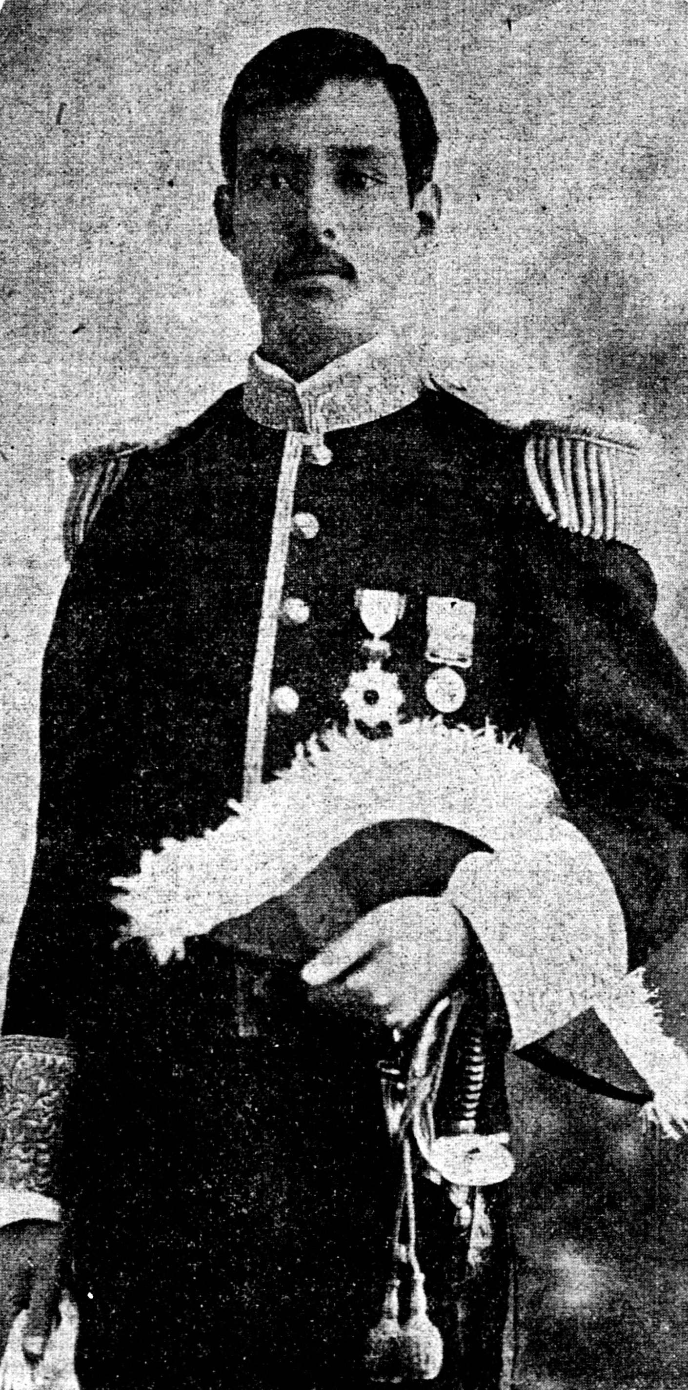 Count Hirokichi Mutsu (陸奥広吉) in 1899.